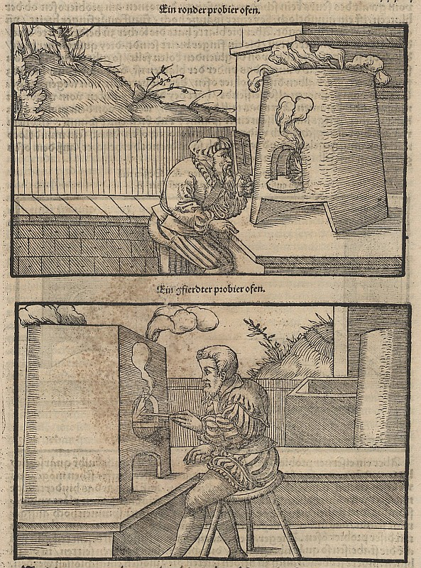 Original image description from the Deutsche Fotothek Bergwerk & Bergbau & Metallurgie & Probierofen